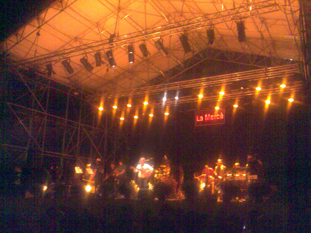 Miquel Gil & Sva-ters @ Plaça Sant Jaume (Barcelona) 23/09/2007